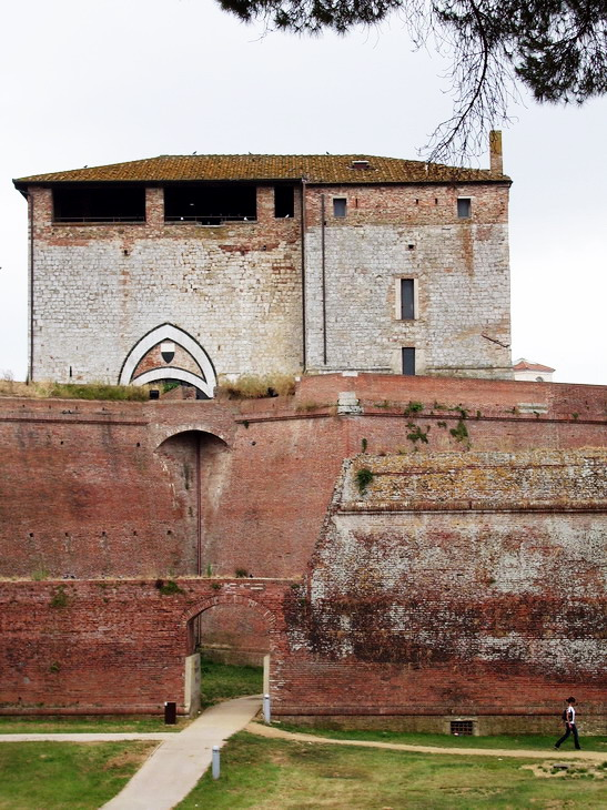 Il Cassero Senese visto da fuori le Mura di Grosseto, Tuscany (Italy)